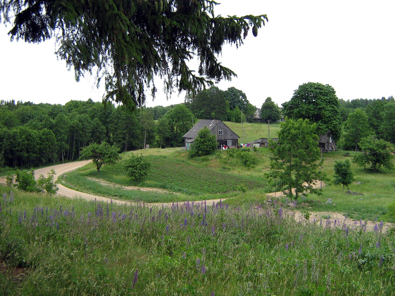 Mikytai, gamtovaizdis, Plungės rajonas, Žemaitijos nacionalinio parko teritorija Foto: Algirdas, 2007 m. birželio 15 d., Lietuva